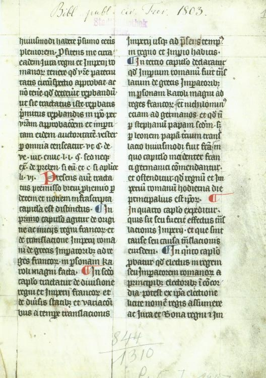 Lupold von Bebenburg: Tractus de iuribus regni et imperii, Stadtbibliothek/Stadtarchiv Trier (Hs. (44/1310 4°), Aufnahme Anja Runkel.